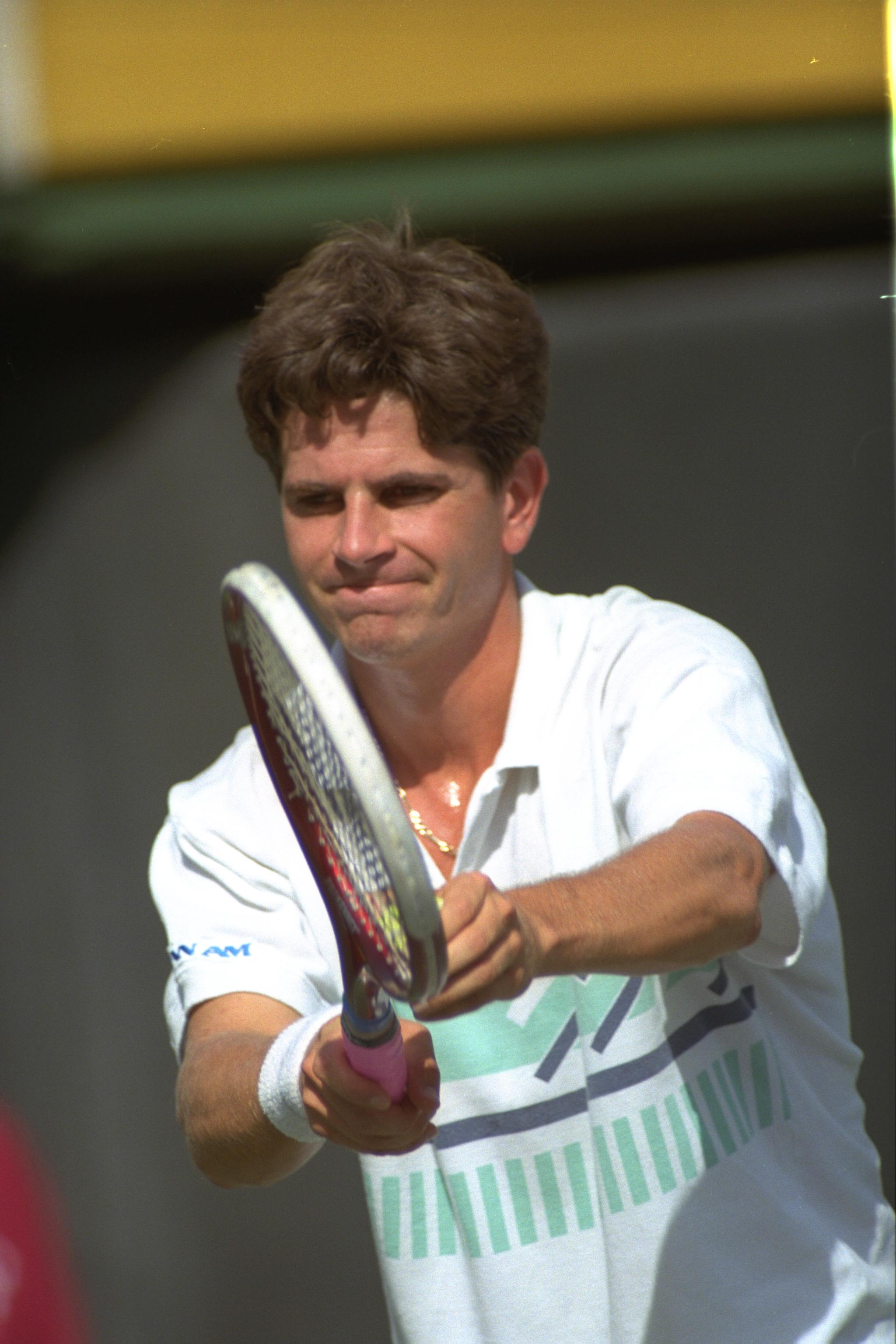 Israeli tennis player Amos Mansdorf playing against a Chinese opponent during the Davis Cup Tournament held at Ramat Hasharon. הטניסאי הישראלי, עמוס מנסדורף במשחק כנגד יריבו היפאני במהלך גביע דיוויס ברמת השרון